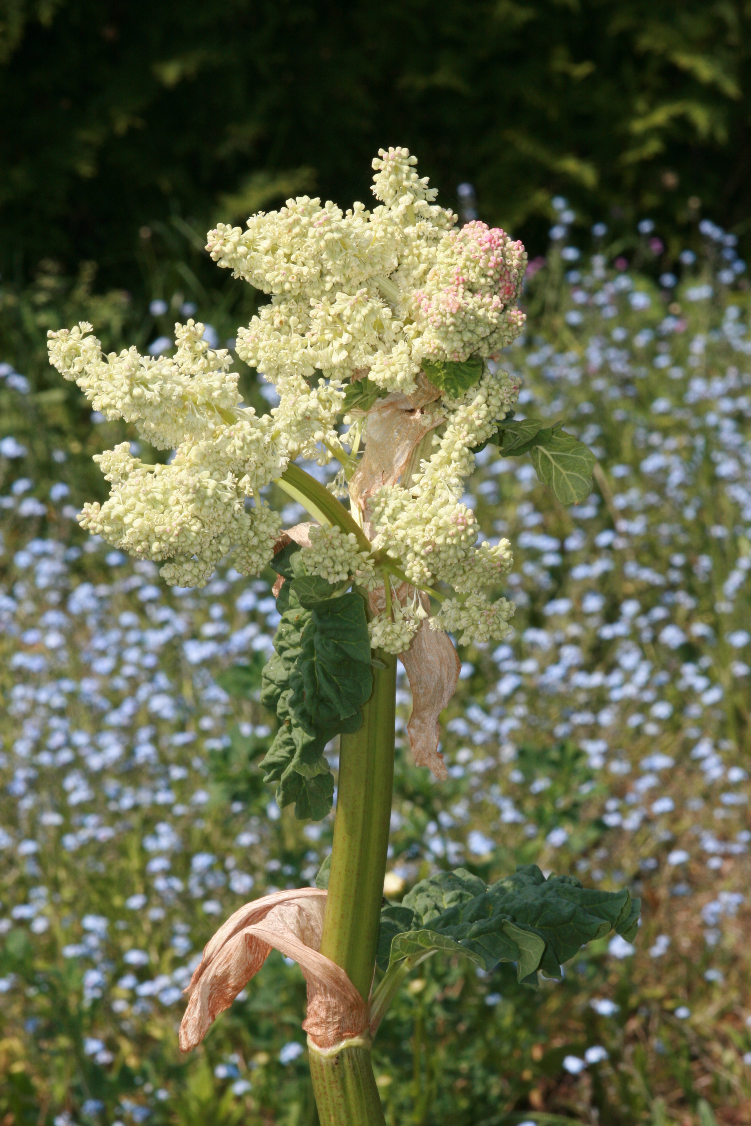 Blütenstand einer Rhabarberpflanze